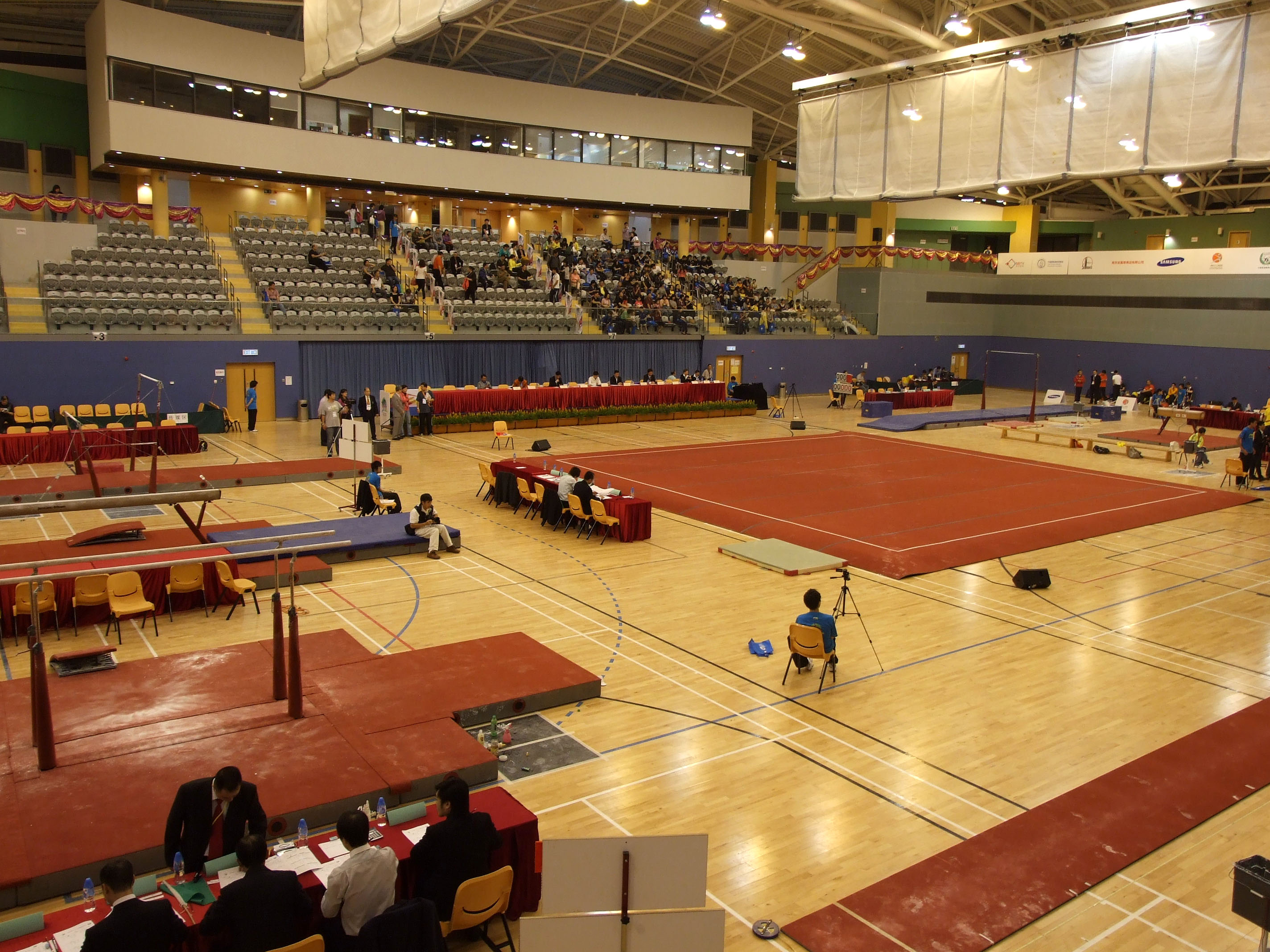 中文（香港）: 馬鞍山體育館內觀